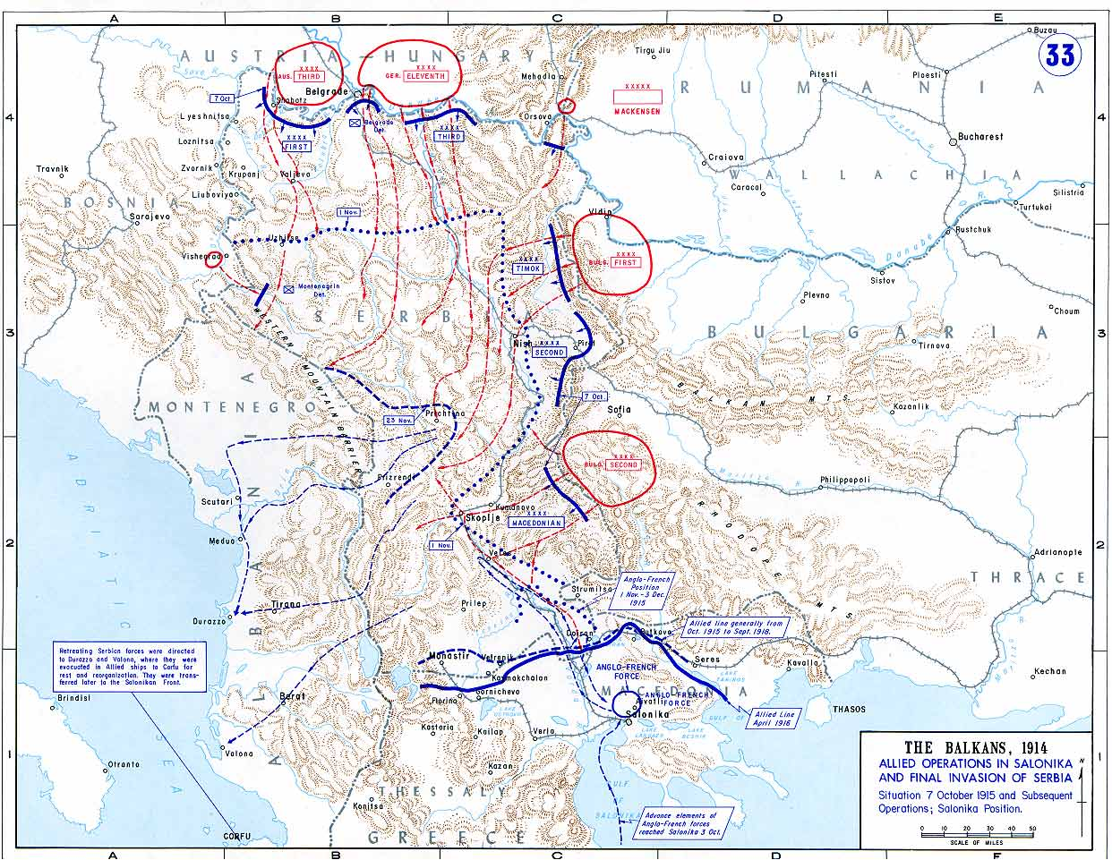 Opérations militaires en Serbie, en 1915. Document public des Etats Unis.